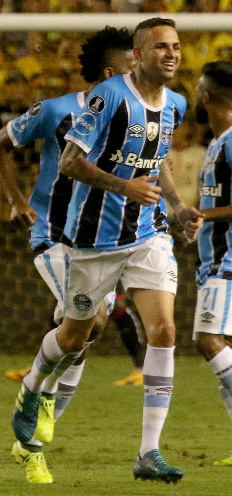 Guayaquil 25 de octubre del 2017 (Andes).- En el estadio Monumental, Barcelona se enfrenta a Gremio de Porto Alegre en el partido de ida por la semifinal de la Copa Libertadores 2017 Foto:Andes/César Muñoz